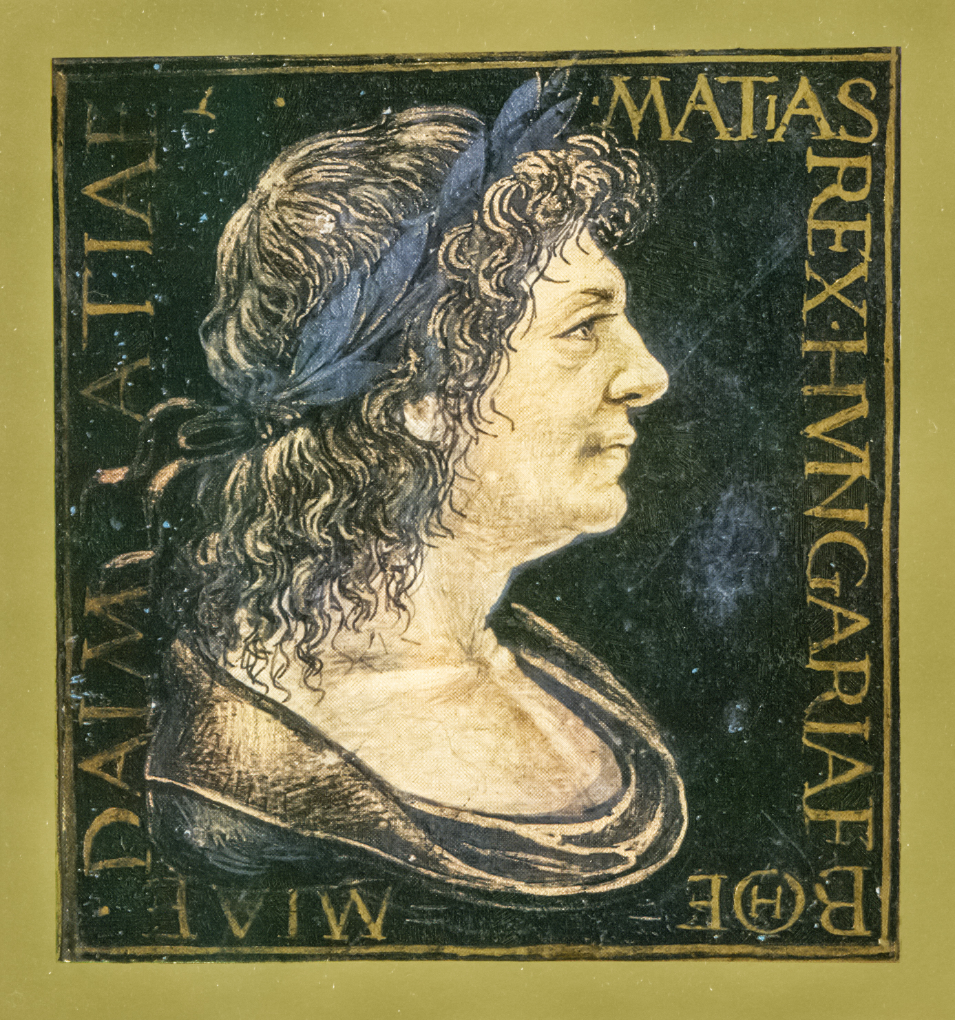 a Marlianus Mediolanensis-corvinában, Volterra. A kódex Marlianus milánói szenátor Corvin János és Maria Bianca Sforza eljegyzése alkalmából elmondott üdvözlő beszédét tartalmazza. Az egykor a Corvina Könyvtárhoz tartozó könyv díszítését Ambrogio de Predis lombard miniátor készítette 1488 körül.